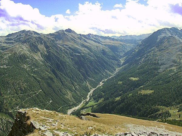 Zwischbergental Picture taken by user Idéfix , august 27, 2006